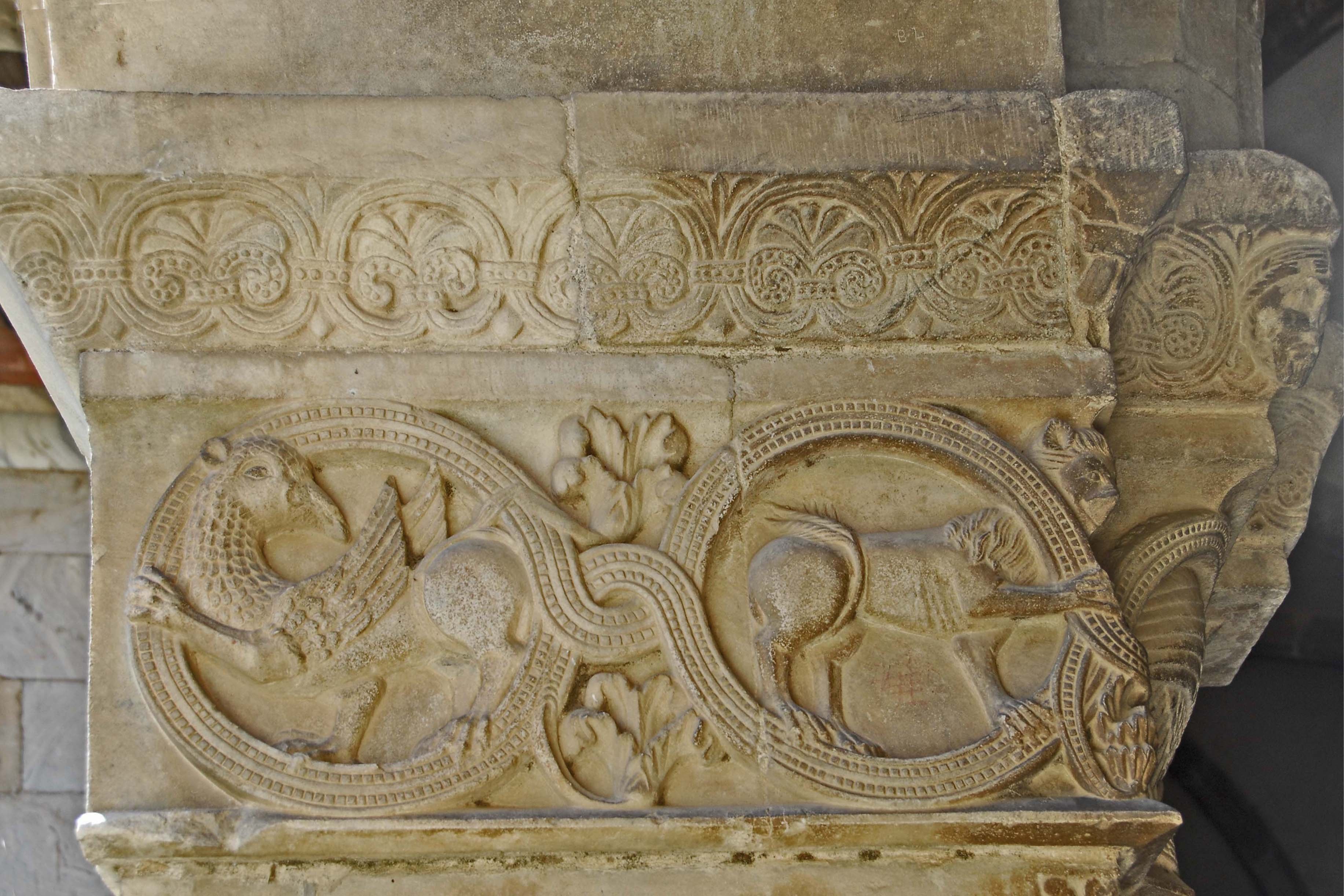 Ste-Eulalie-et-Ste-Julie_d’Elne, Westgalerie, Pfeilerkapitell, Greif und Löwe